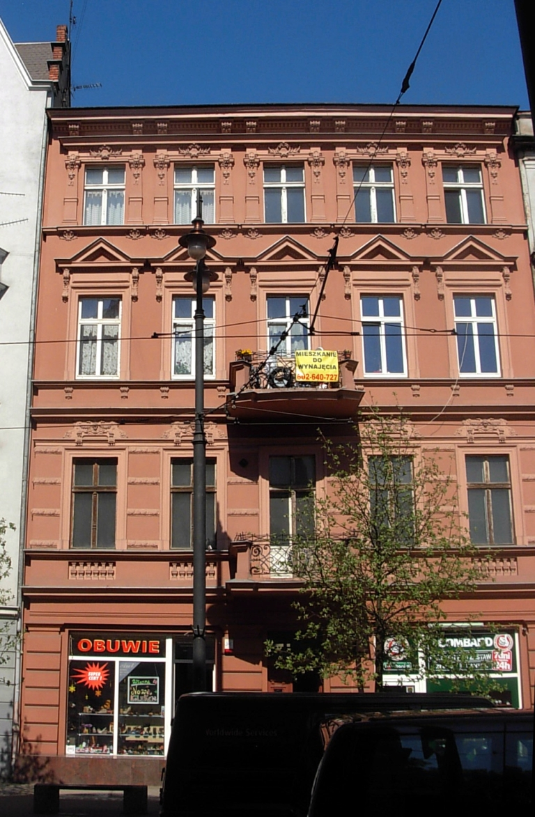 Kamienica przy ul. Gdańskiej 81 w Bydgoszczy (1897)